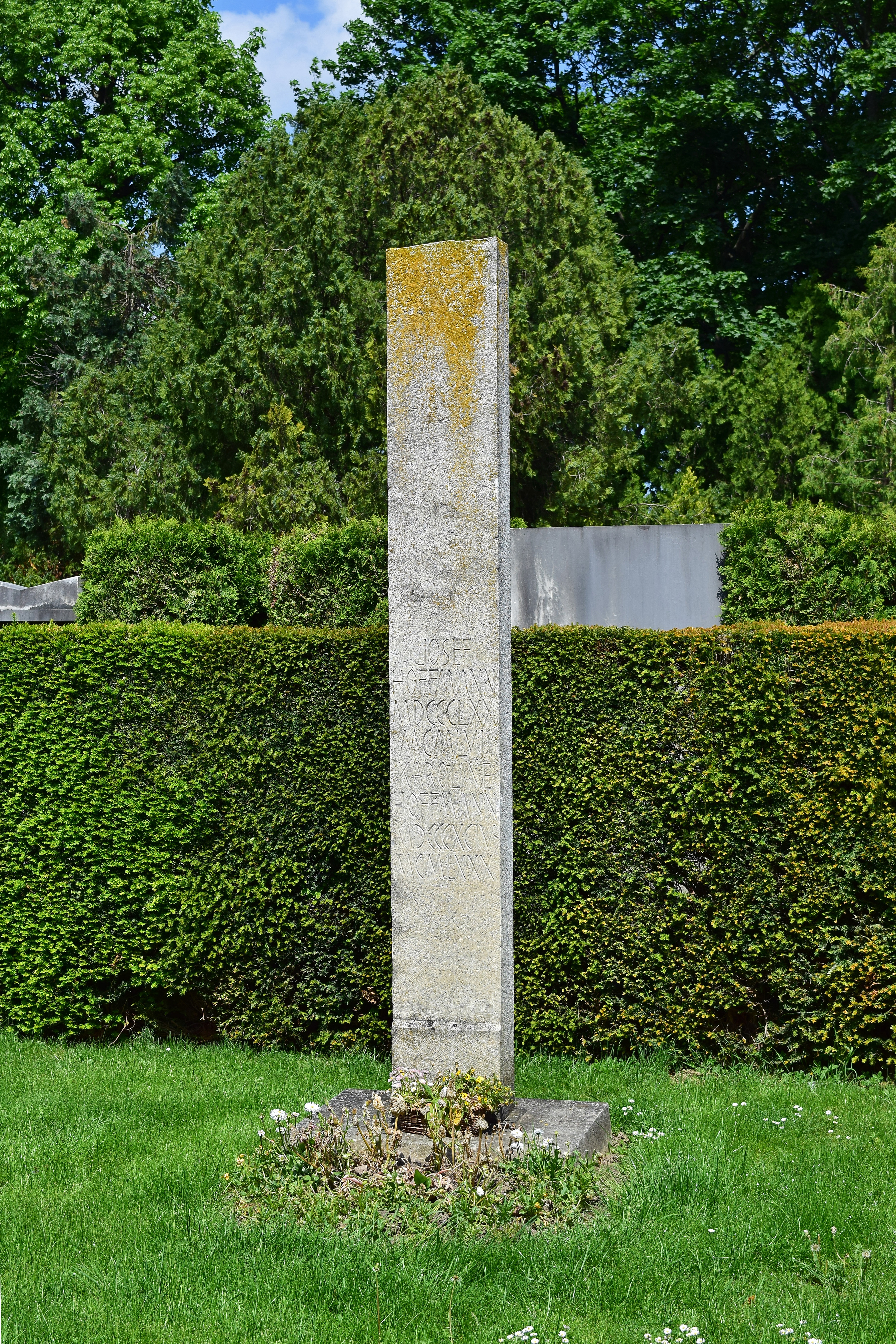 Ehrengrab von Josef Hoffmann auf dem Wiener Zentralfriedhof. Gestaltet von Fritz Wotruba.